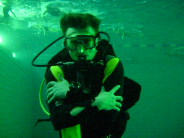 Diving signal cold